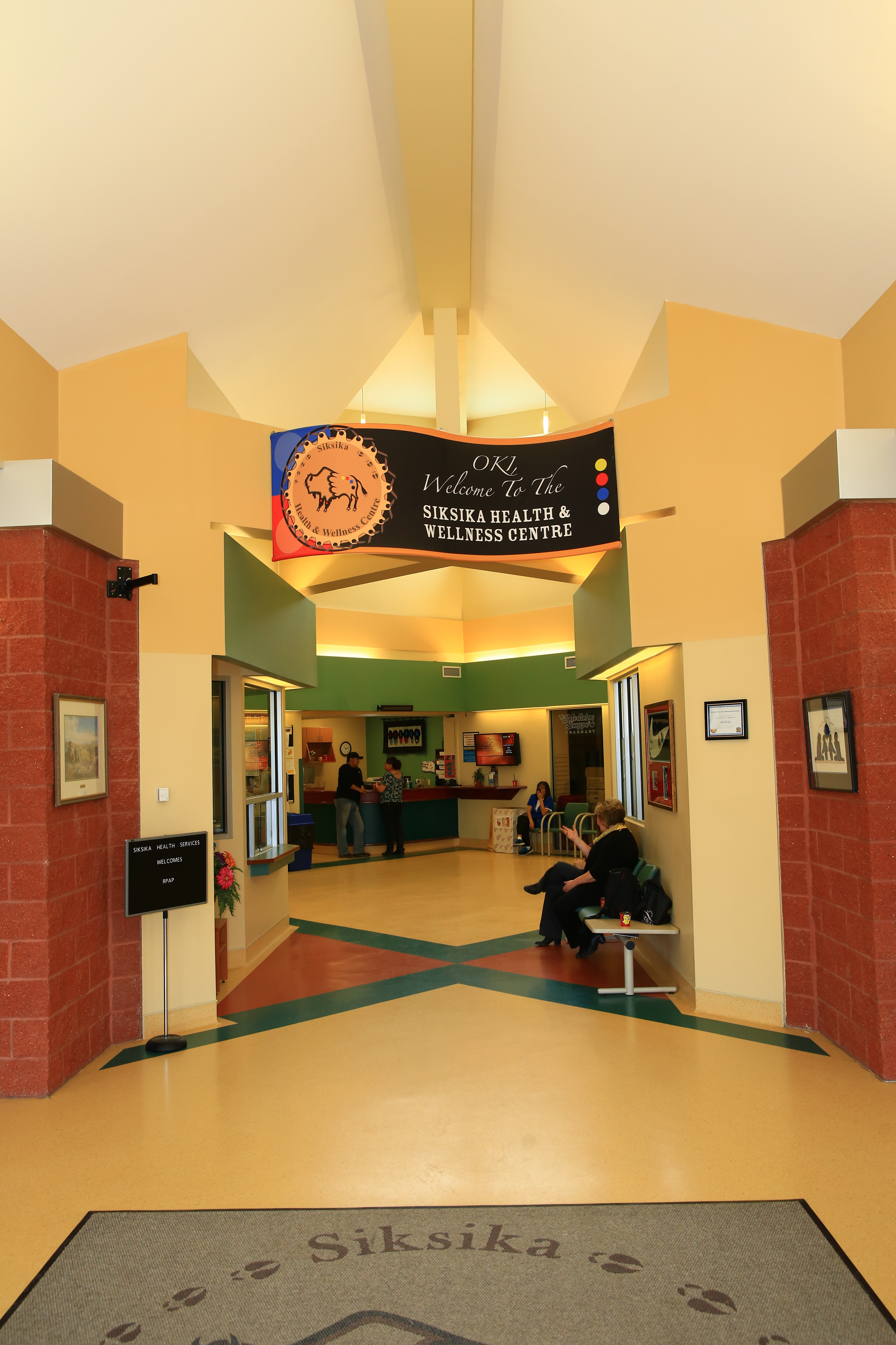 Siksika Health and Wellness Center